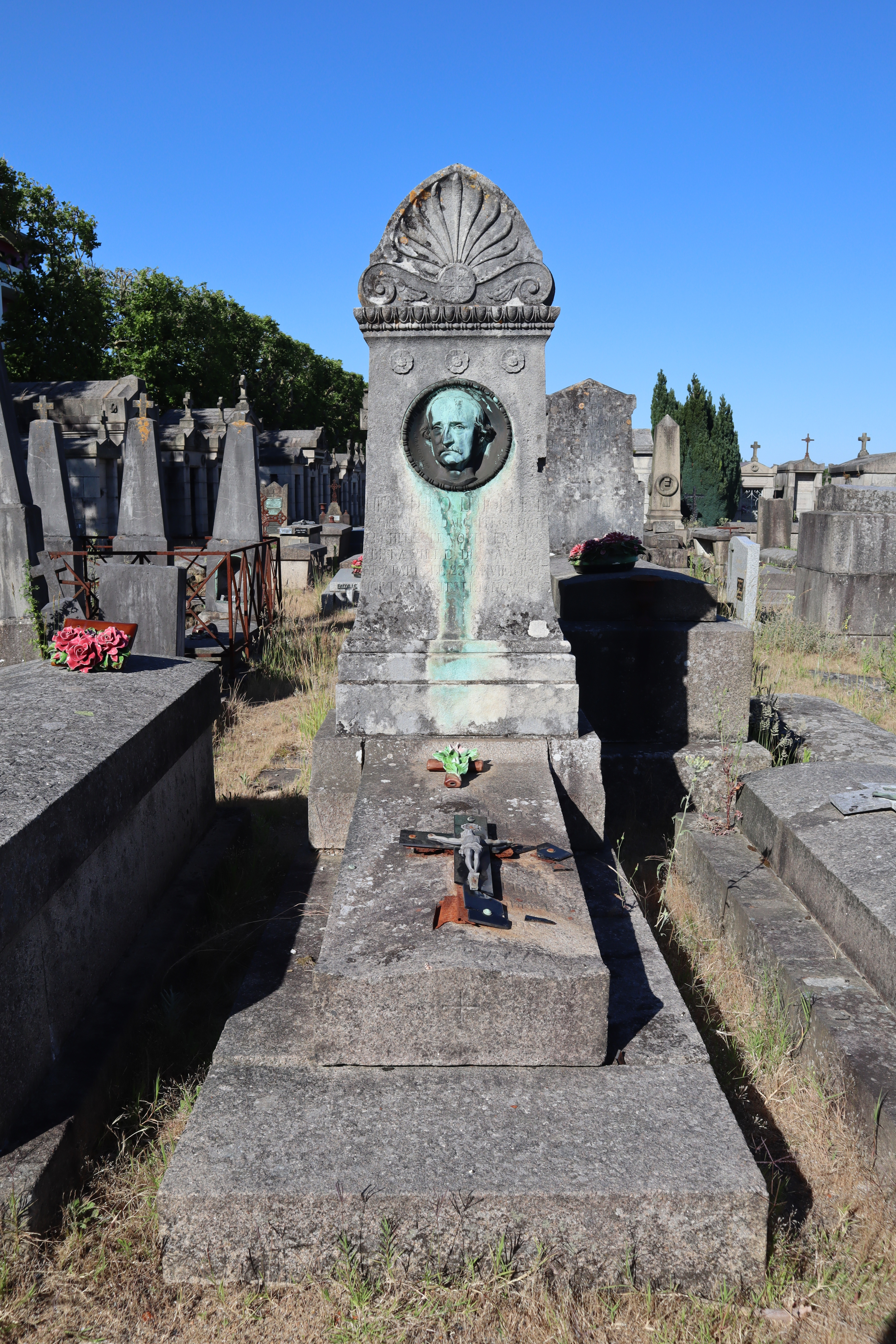 Tombe de Henri-Théodore Driollet au cimetière La Bouteillerie à Nantes (44). Médaillon en bronze de Guillaume Grootaërs.